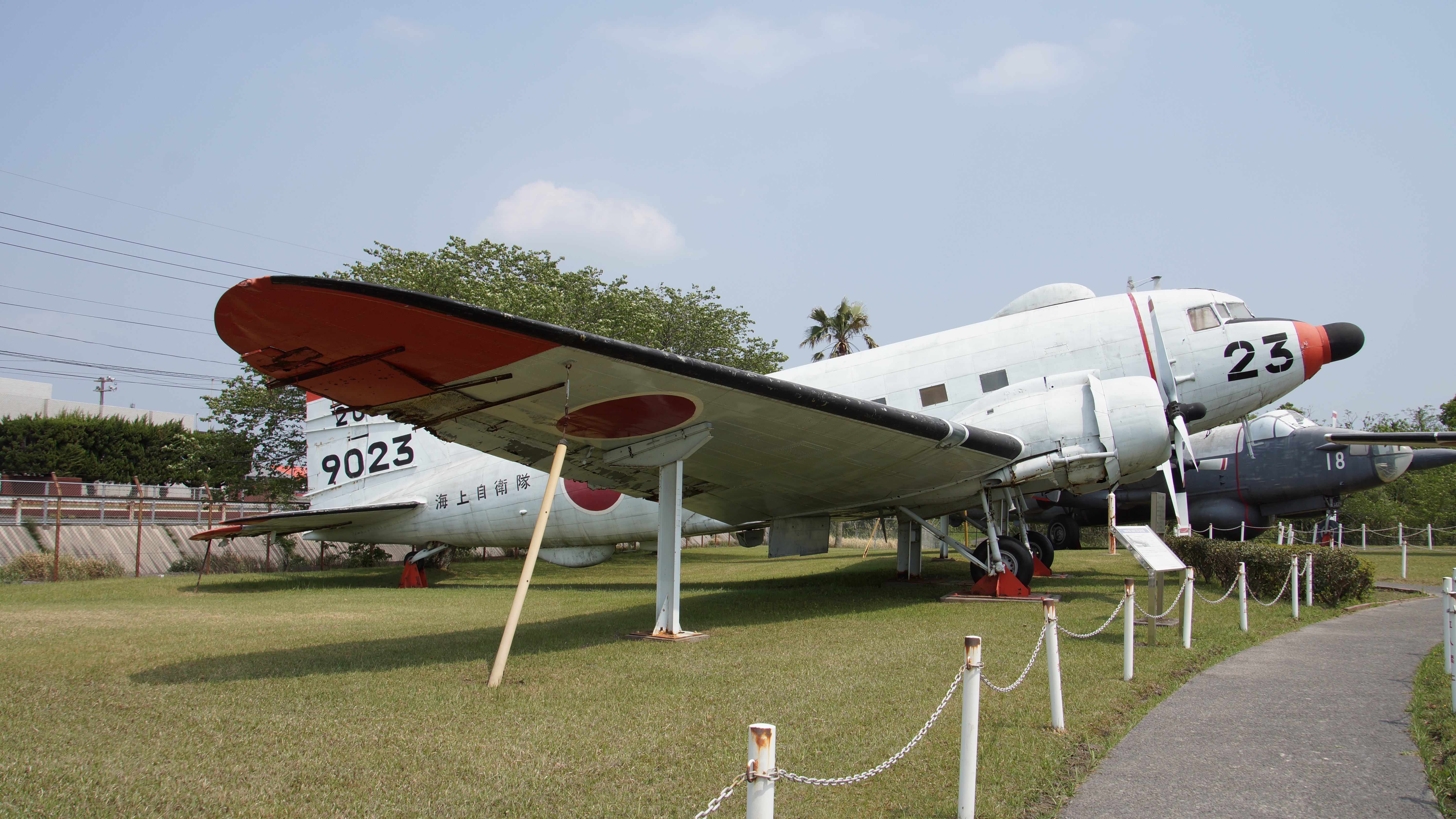 海上自衛隊 R4D-6Q電子戦訓練機（9023号機） 右前面。2017年4月29日 海上自衛隊鹿屋航空基地史料館にて。